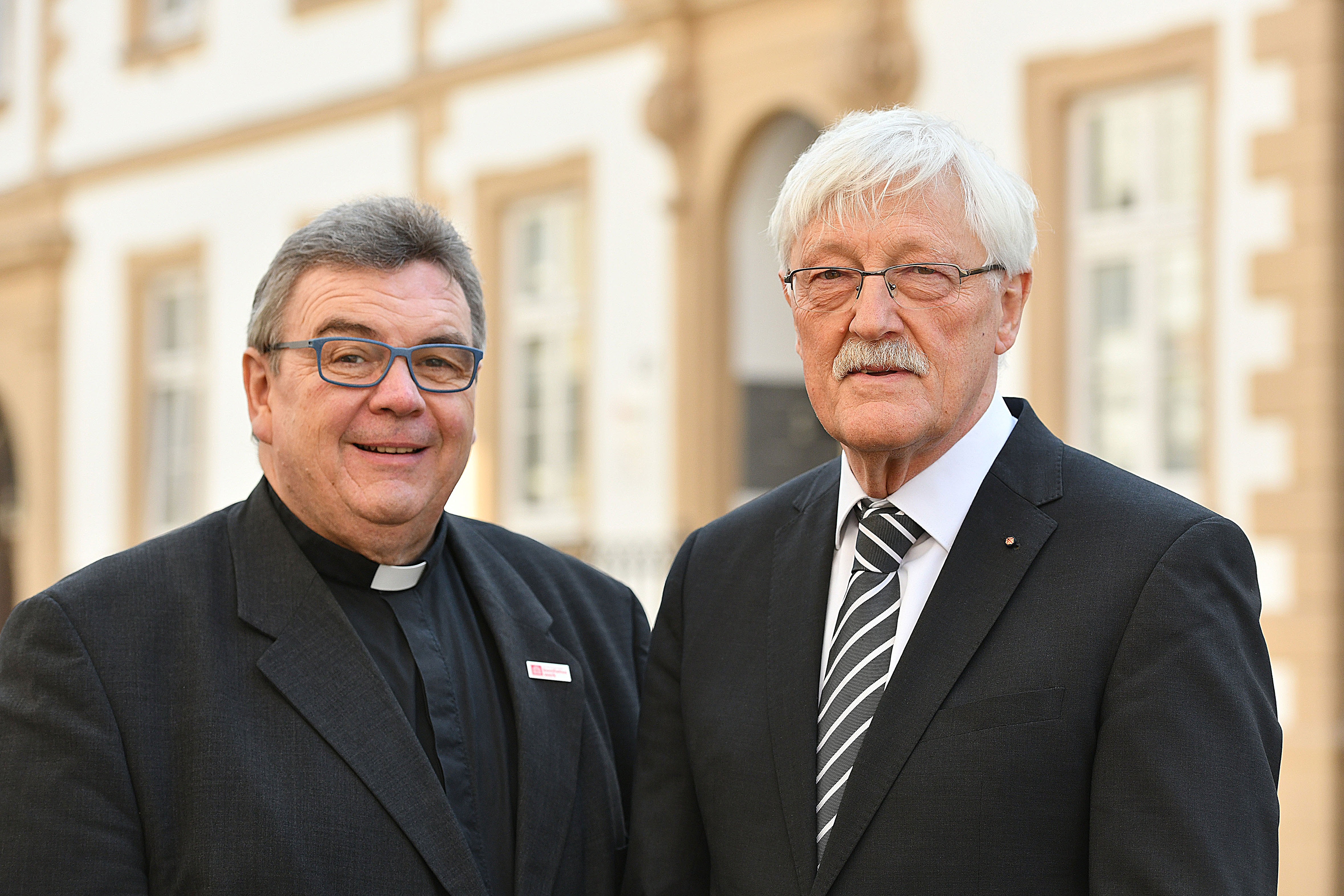 Der Generasekretär des Bonifatiuswerkes Monsignore Georg Austen (links) und Präsident Heinz Paus.